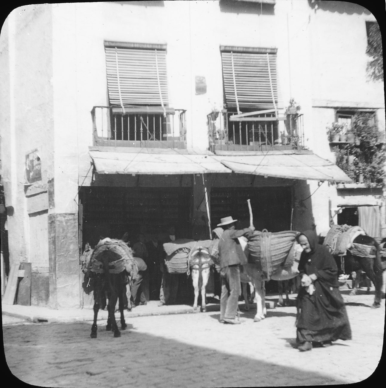 Posada, Cordoba, 1910. Photo by Sigurd Curman.